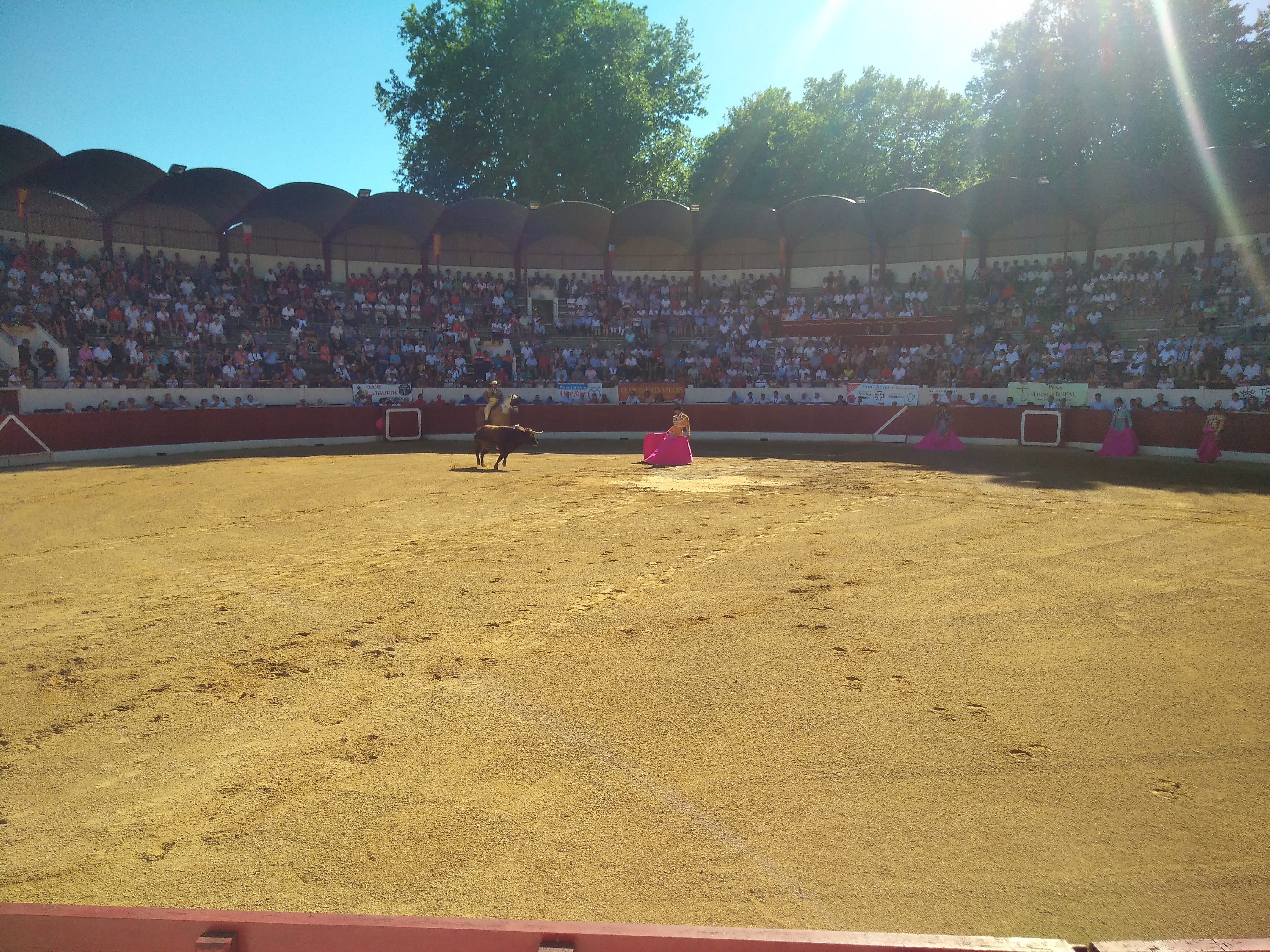 Ivan Fandiño toréant son dernier taureau (dont il obtient quelques minutes plus tard une oreille) à la corrida d'Aire-sur-l'Adour, avant de mourir, blessé lors d'une passe offerte par Del Alamo